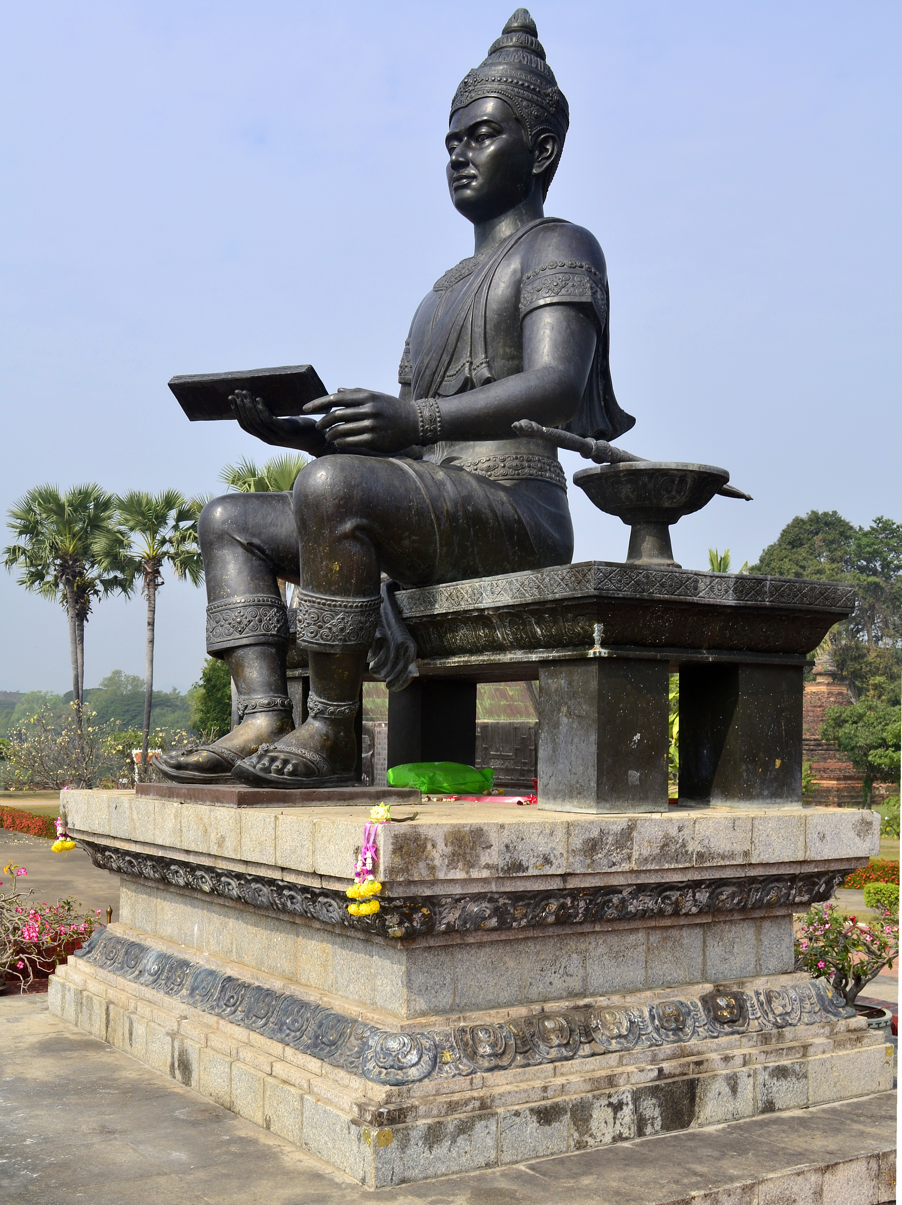 King Ramkhamhaeng Monument